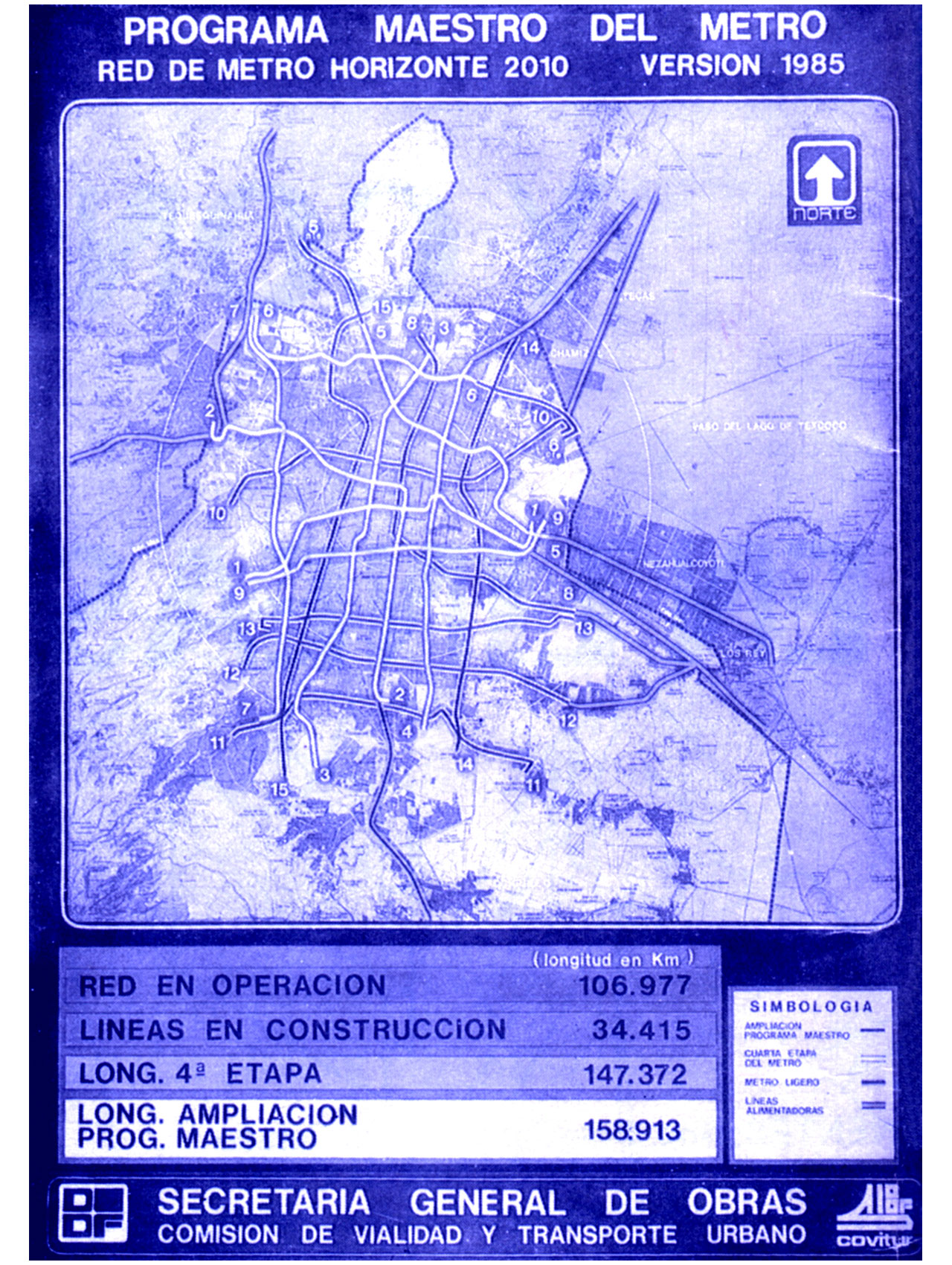 Fotografía de una copia heliográfica del "Programa Maestro del Metro versión 1985 horizonte 2010" propuesto por los órganos de gobierno desaparecidos: Departamento del Distrito Federal y la Comisión de Vialidad y Transporte Urbano, México